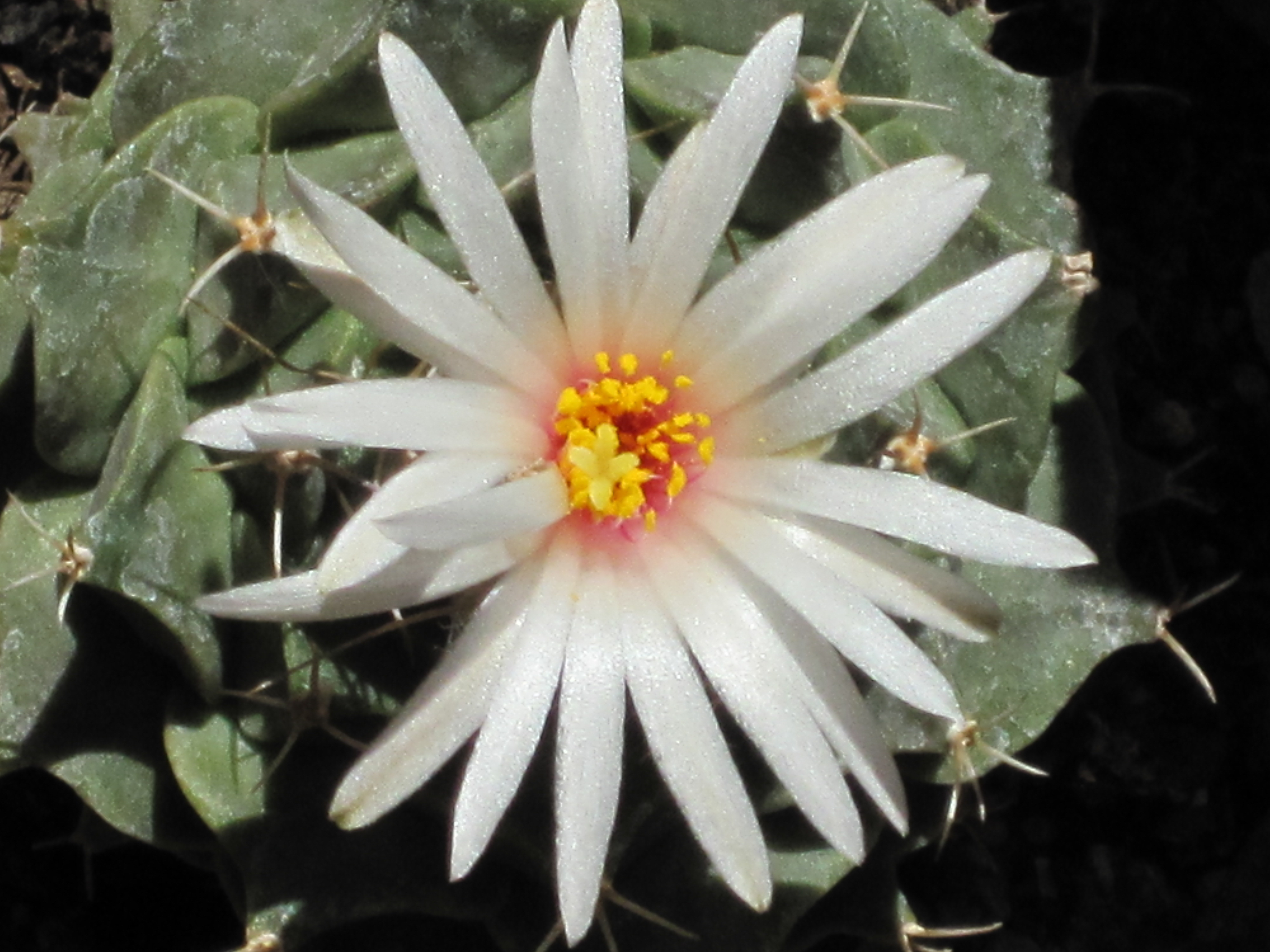 Il fiore della obregonia denigrii